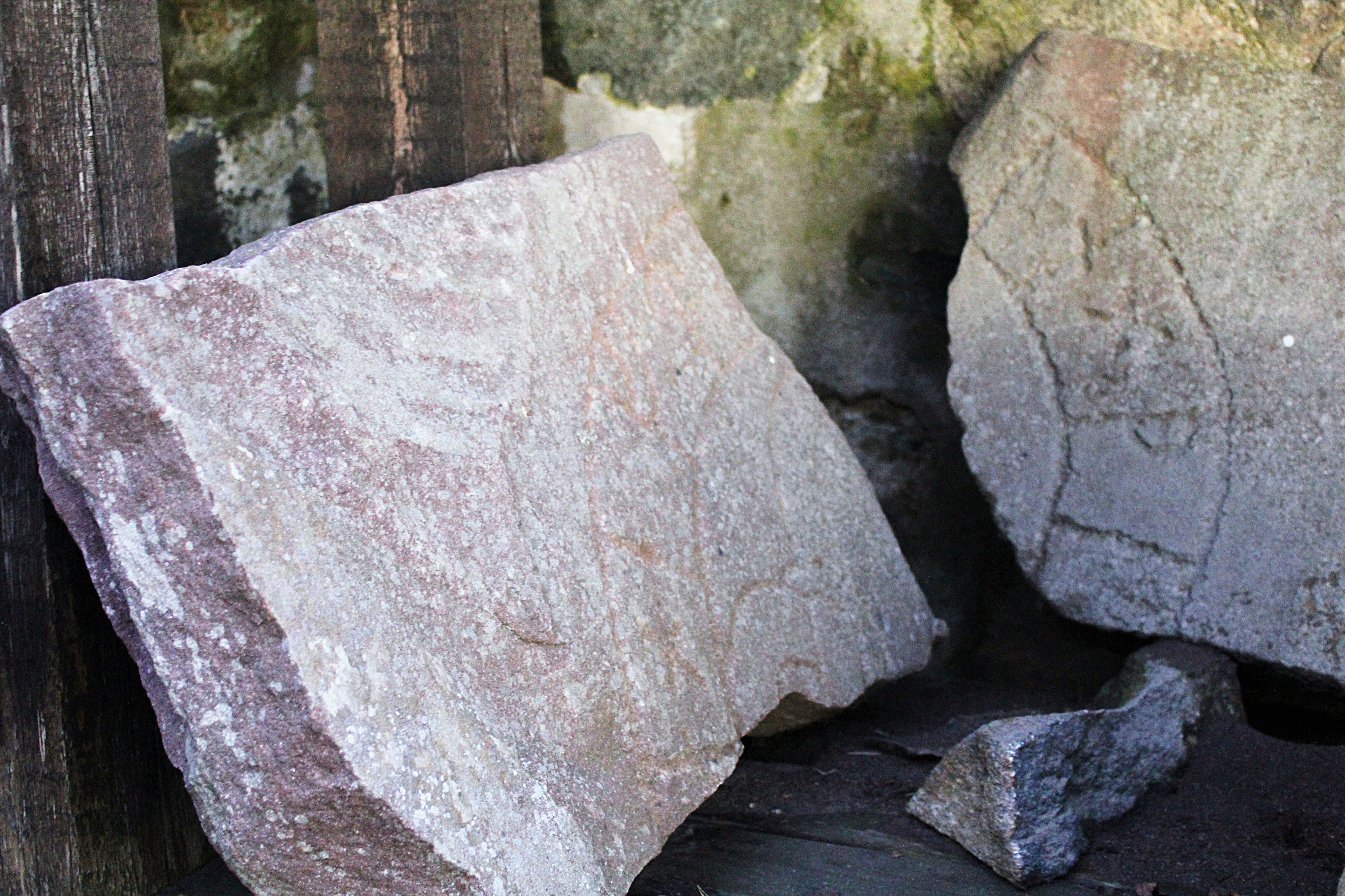 Två runstensfragment i vapenhuset i Karls kyrkoruin i Söderby-Karls socken, Norrtälje kommun.